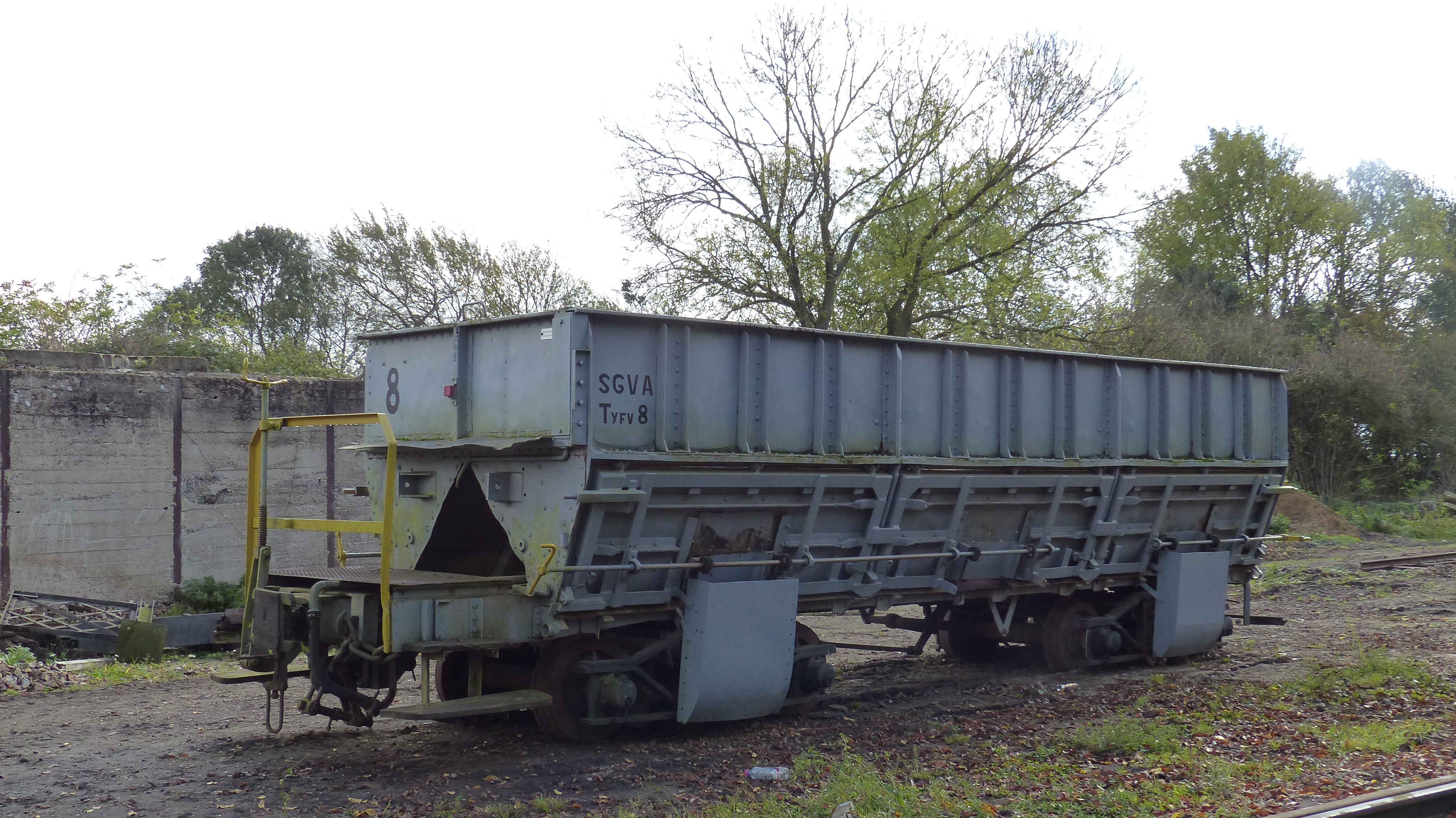 Wagon trémie Tyfv8 de la SVGA confié au MTVSWagon trémie à bogies, type auto-déchargable, 1948, ex "Mines Orne ", Moyeuvre-Grande, Société Lorraine des aciéries de Rombas